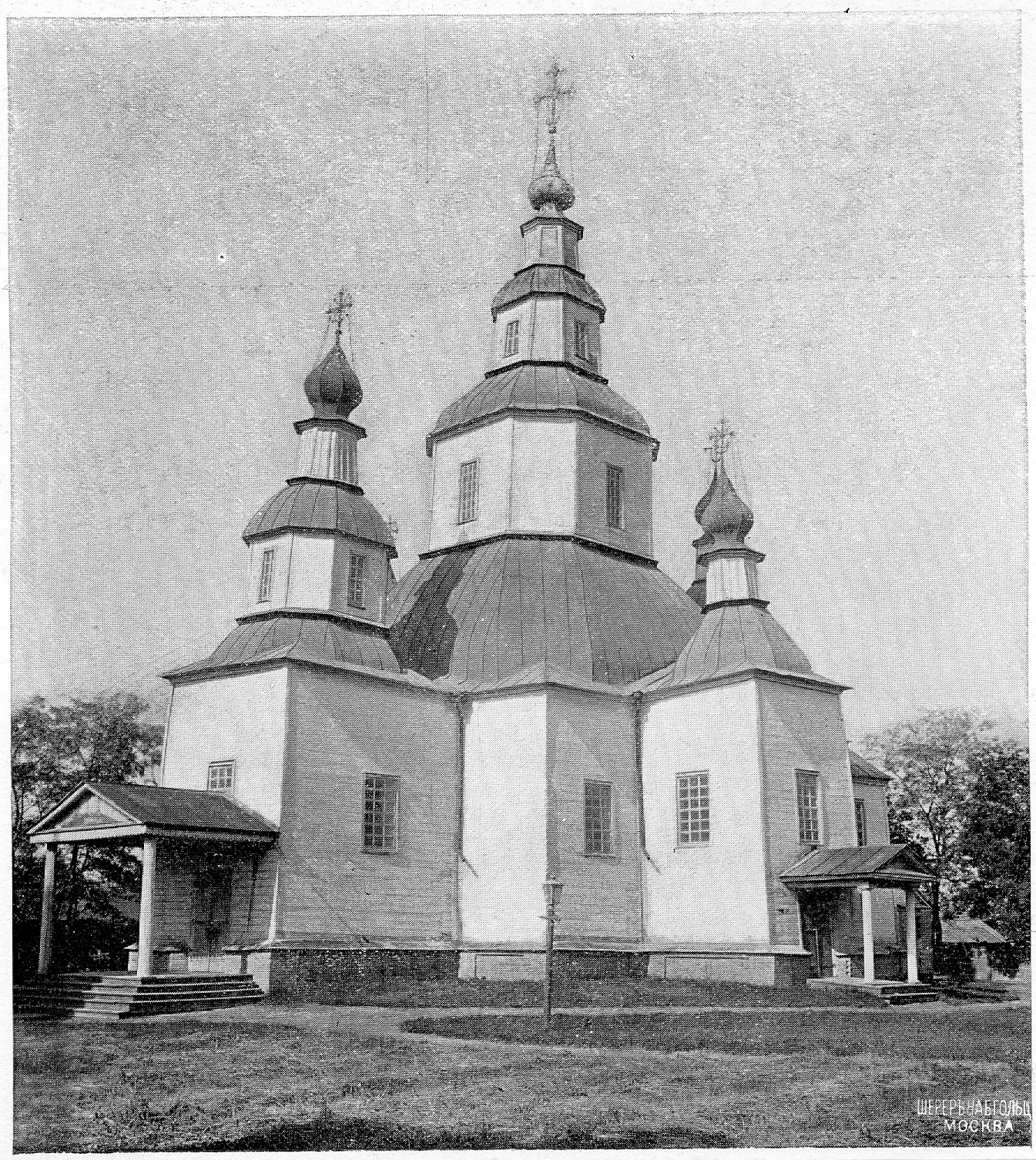 Спасо-Преображенська церква у м. Лохвиця. Побудована у 1786 році. Зруйнована в кінці 1940-х - на початку 1950-х років.